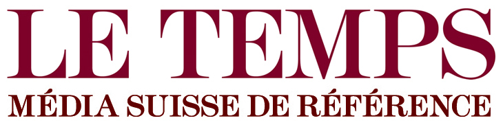 Logo du Temps